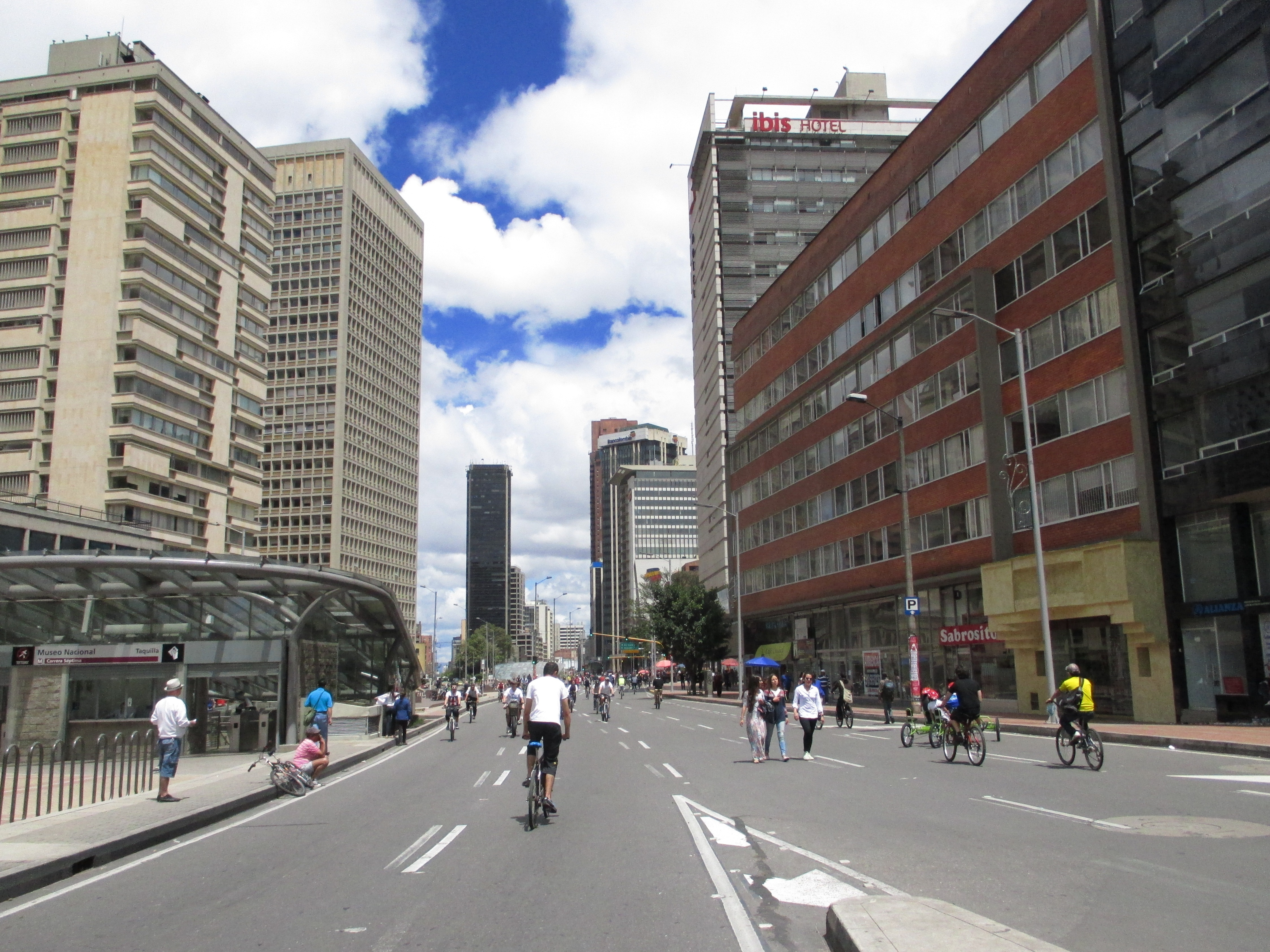 Bogotá ciclovía cr 7 cl 27